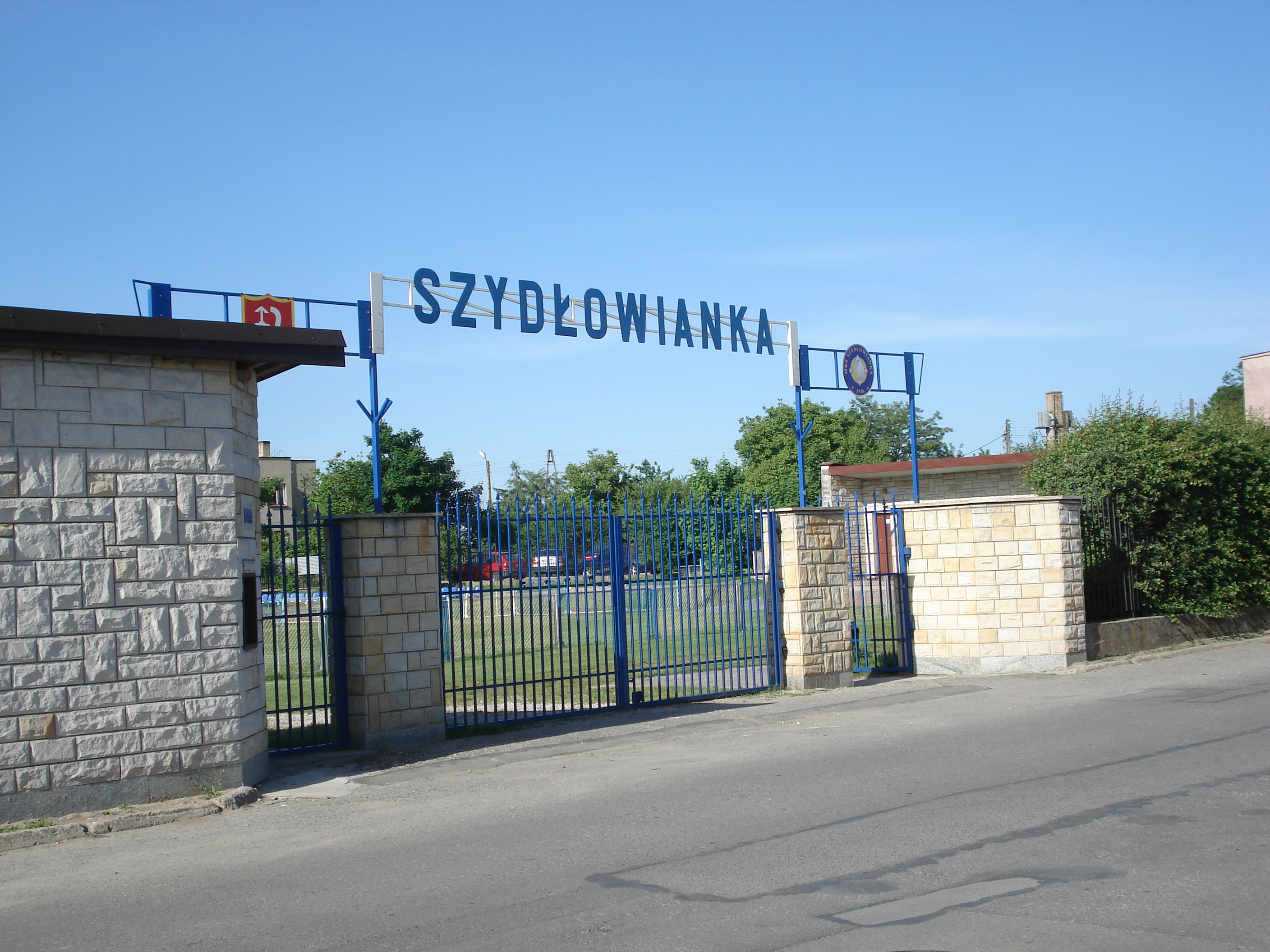 Brama stadionu MKS Szydłowianki Szydłowiec (ul. Targowa)